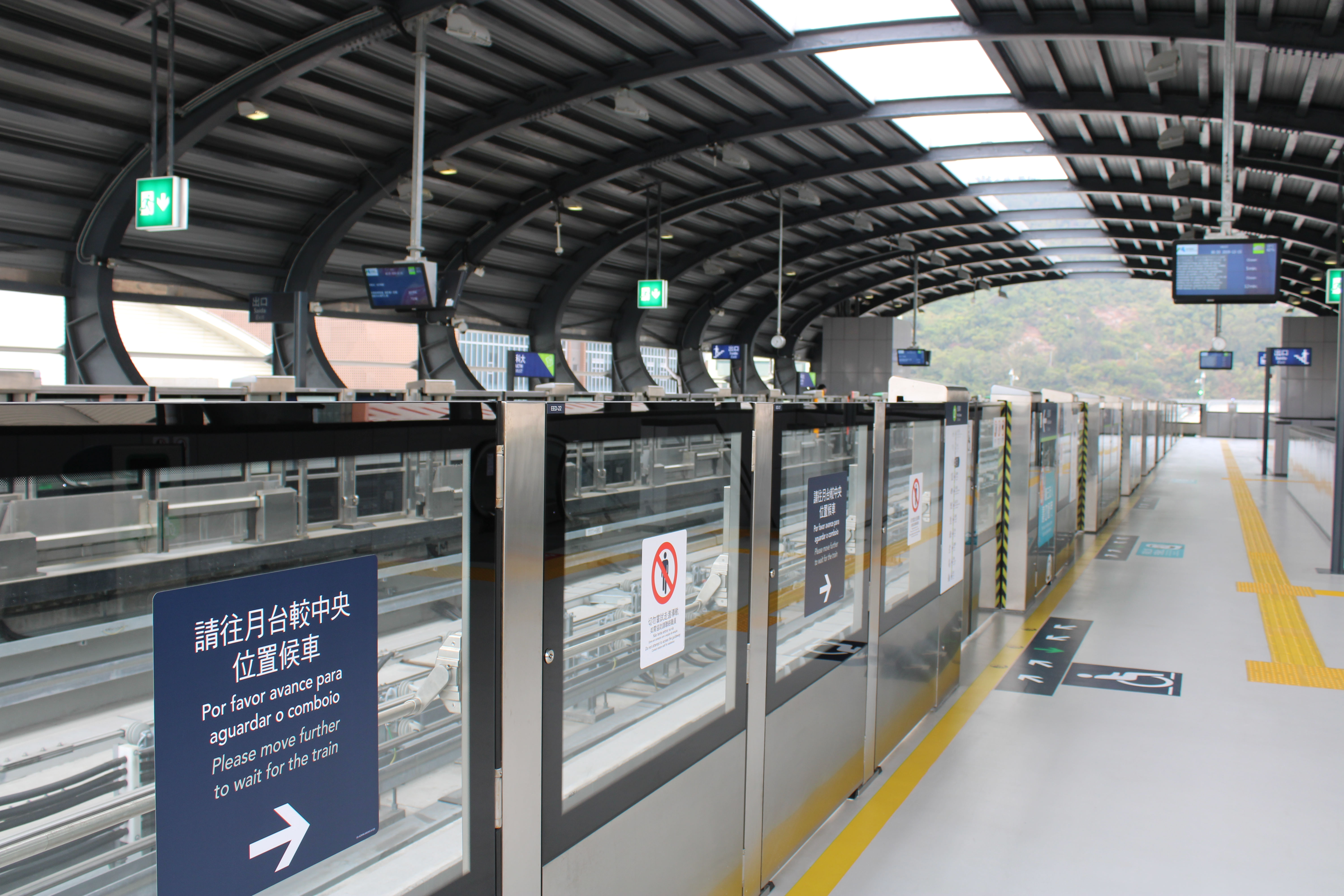 2019年12月的澳門輕軌氹仔線科大站月臺。